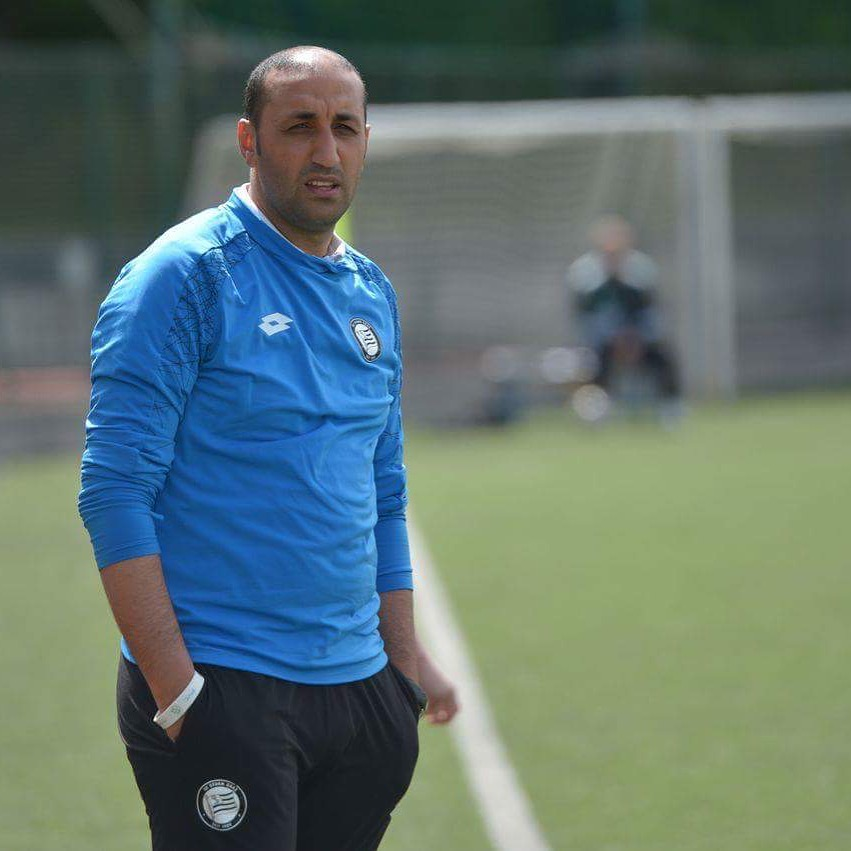 Mohamed Sahli